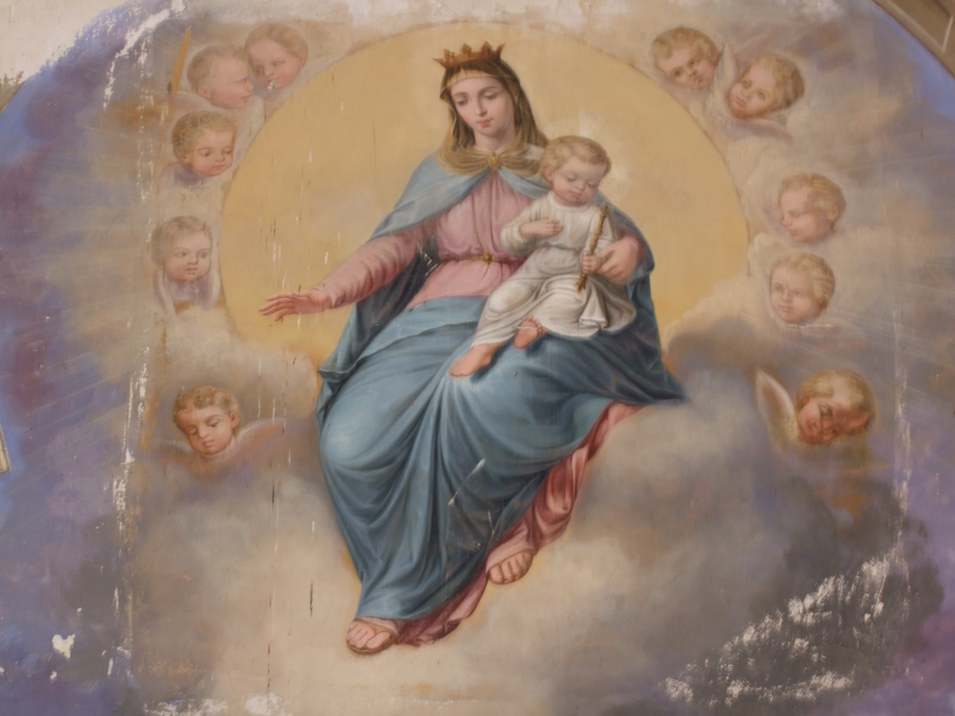 Apparition symbolisant la consécration de la chapelle des Capucins à Notre Dame des Anges en 1871. Datée de 1872 comme peint près de la signature de José Oromi, sous le pied droit de Saint François d'Assise, cette oeuvre particulièrement soignée dans l'expression donnée au visage de la Vierge Marie pourrait trouver son inspiration dans le récit de Sainte Bernadette fait à son curé et à son évêque à propos des apparitions de Notre Dame de Lourdes en 1858. Pour le temps religieux, 14 ans d'écart entre ces apparitions et la peinture de cette oeuvre, c'est peu, dans le contexte des miracles déjà perceptibles à Lourdes, et de l'aménagement fulgurant du Domaine de la Grotte et de ses sanctuaires, encore d'actualité ce marouflage à peine sec. D'autant que l'Eglise connaissait en même temps un renouveau général et un regain de piété Mariale. La teinte bleue du drapé et l'étonnante sérénité juvénile du visage de la Vierge et de son attitude maternelle décrits par Bernadette Soubirous semblent avoir été directement dictées et retranscrits d'une façon transcendantale sur cette oeuvre, par ce contexte, grâce à la sensibilité artistique et spirituelle de José Oromi, tout imprégné d'une culture et d'une foi religieuses parfaitement maîtrisées et traduites dans son art.